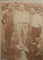 Justo Lescano,futbolista de Rosario Central, al inicio de un encuentro.